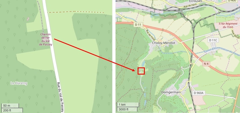 Chemin de Fer du Val de Passey (OpenStreetMap)